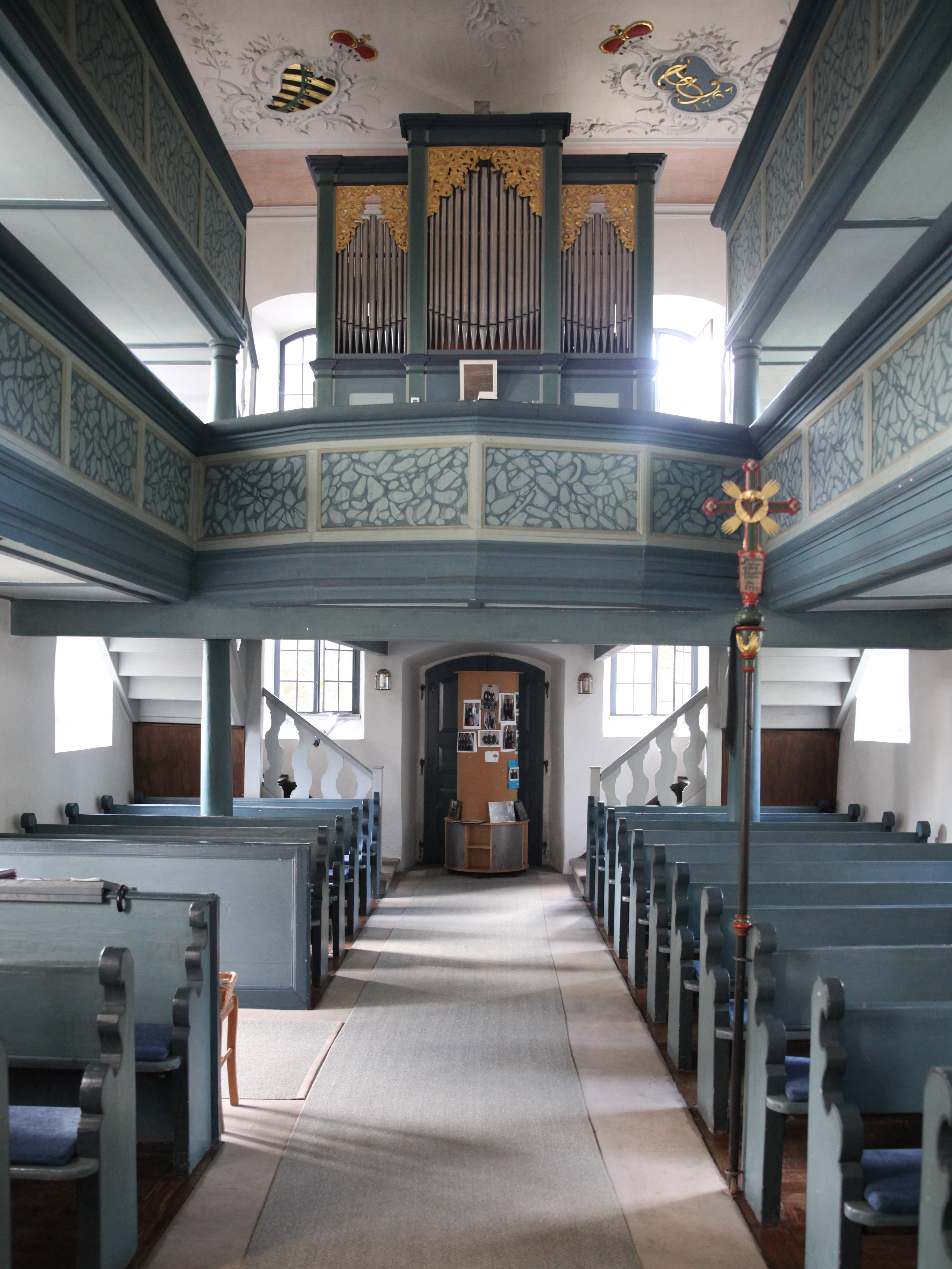 St. Bartholomäus in Ottowind, Meeder